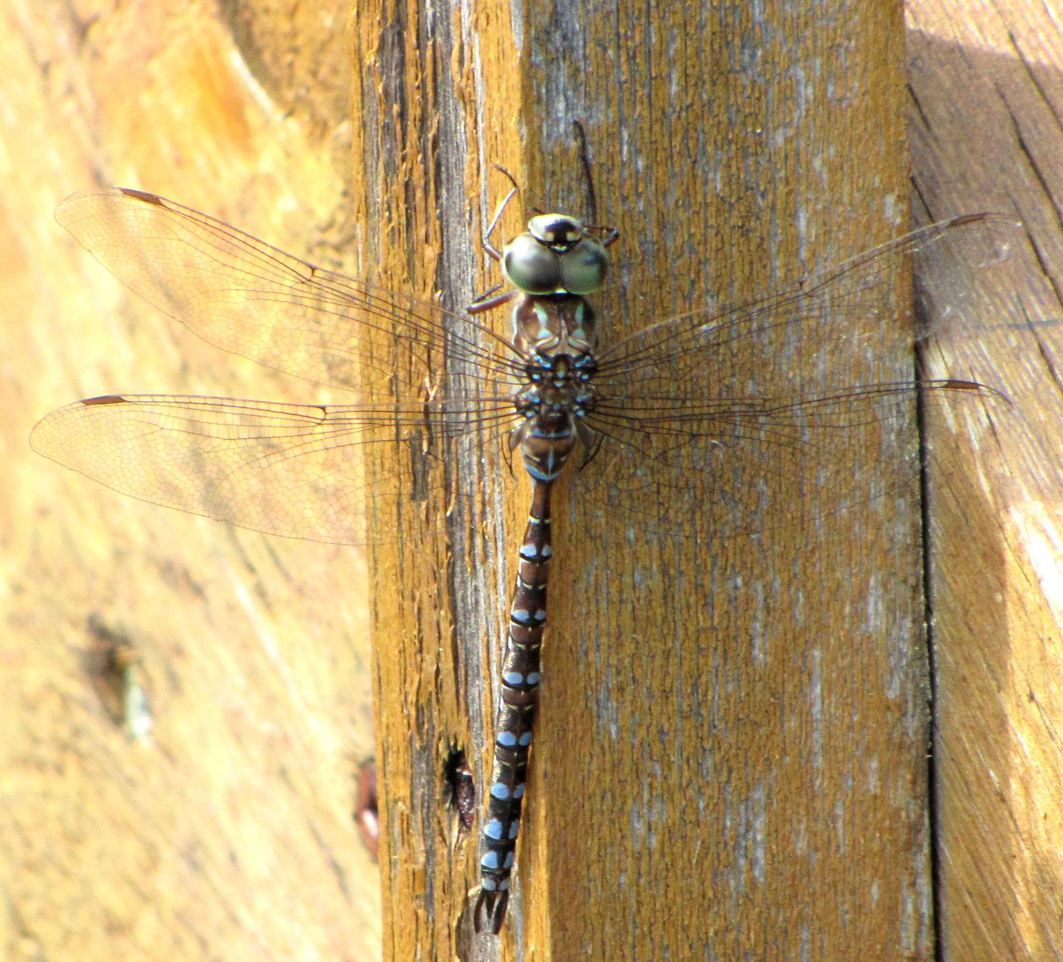 Lake Darner (Aeshna eremita), Ottawa, Ontario, Canada